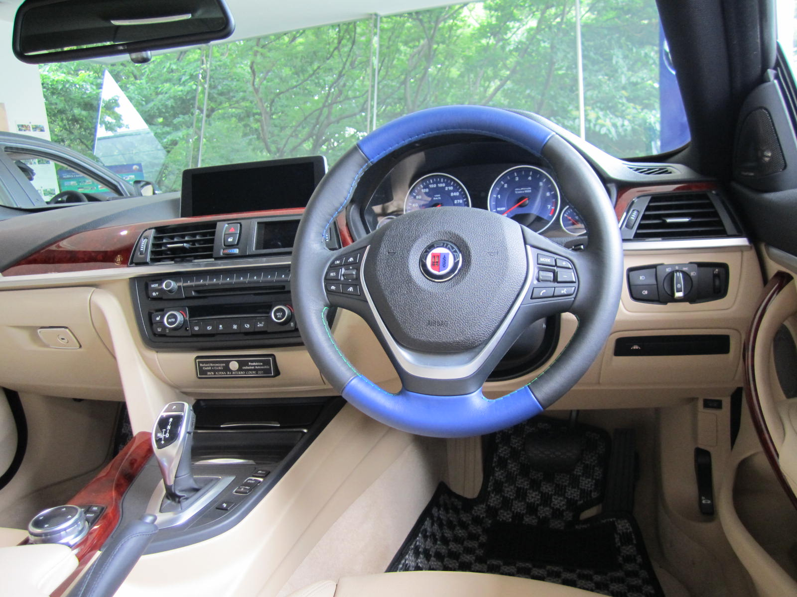 B4クーペ内装